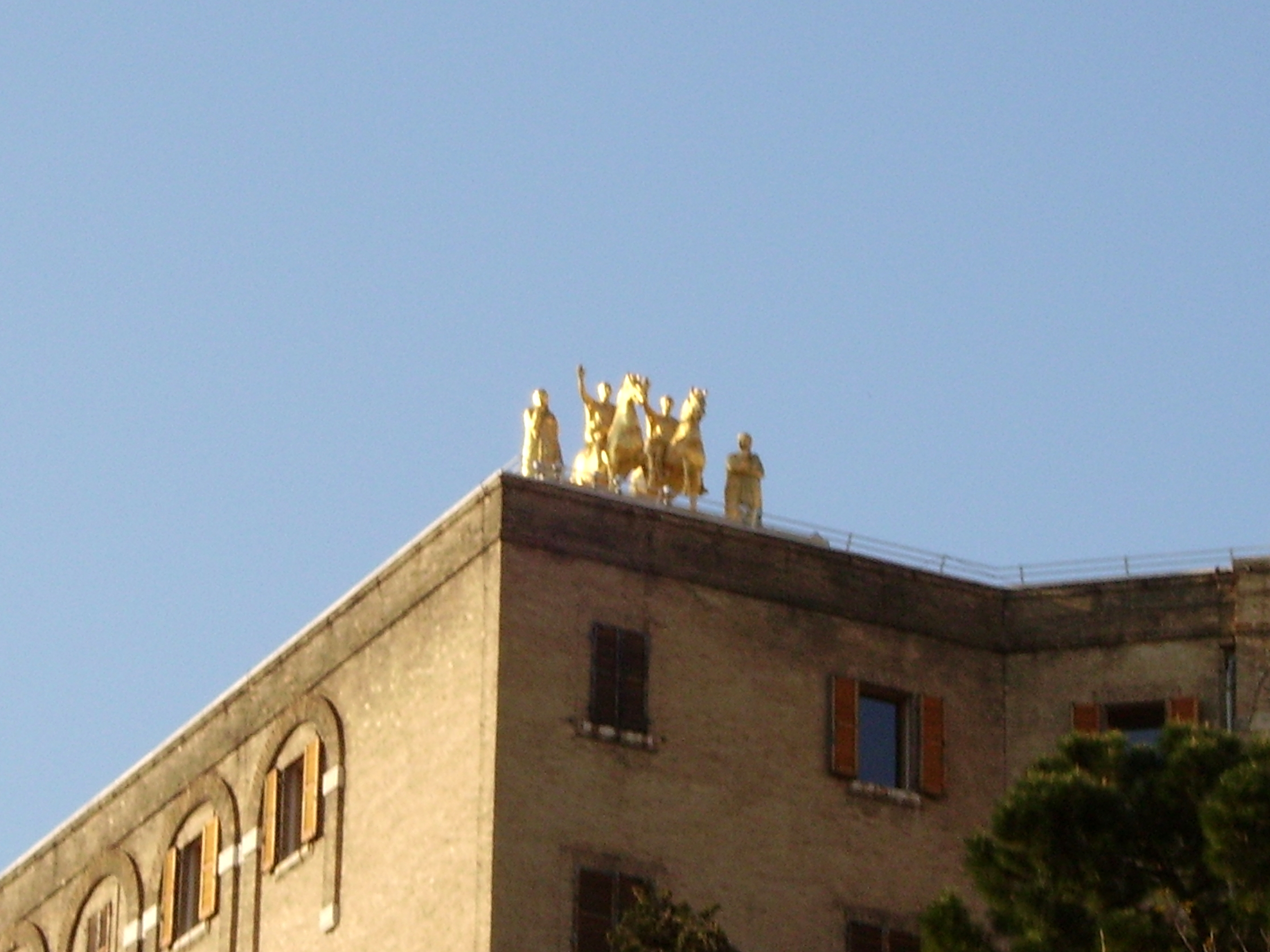 Copia dei bronzi dorati da Cartoceto di Pergola a palazzo Ferretti in Ancona.